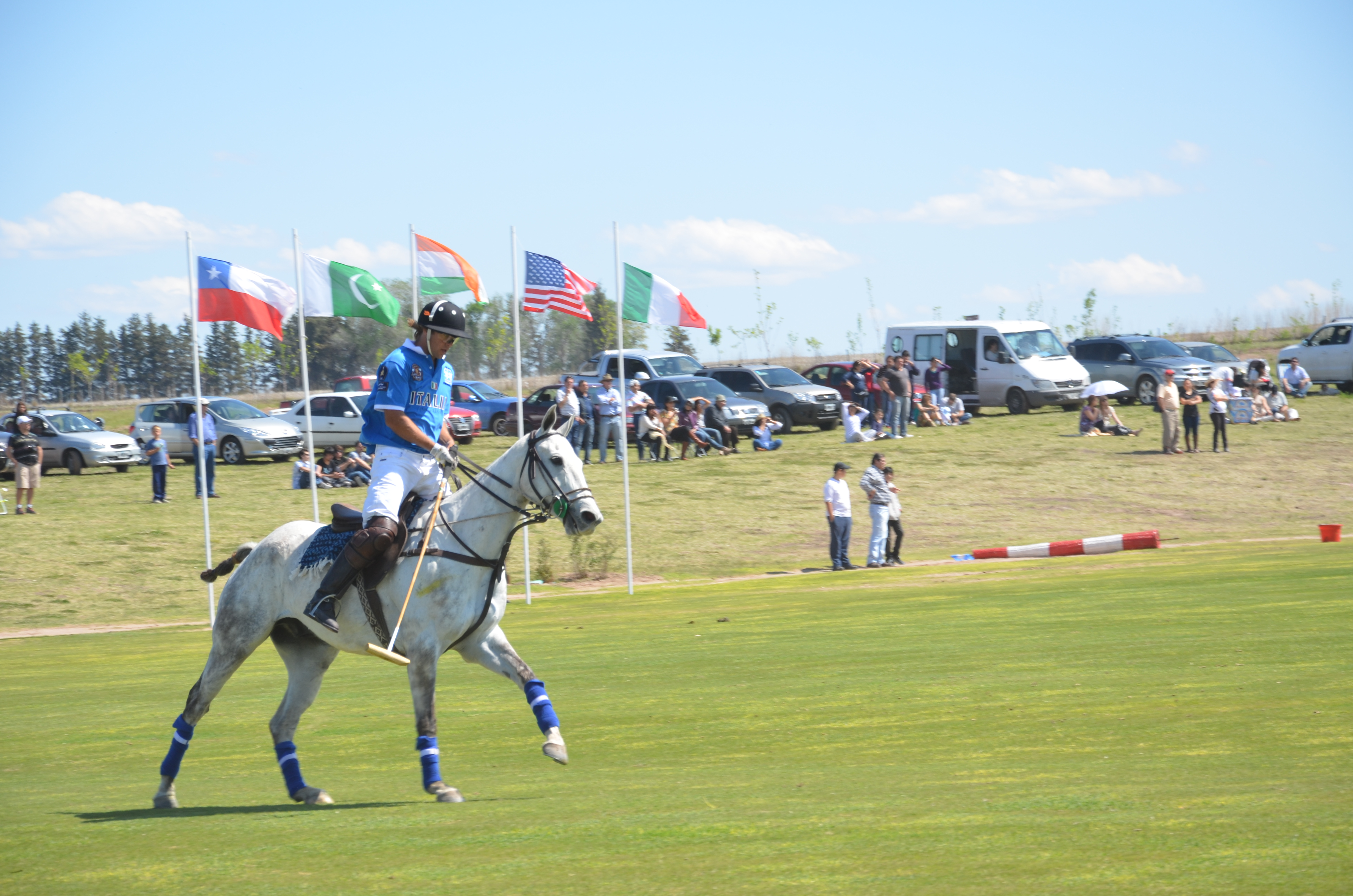 Mundial De Polo San Luis 2011 en Argentina